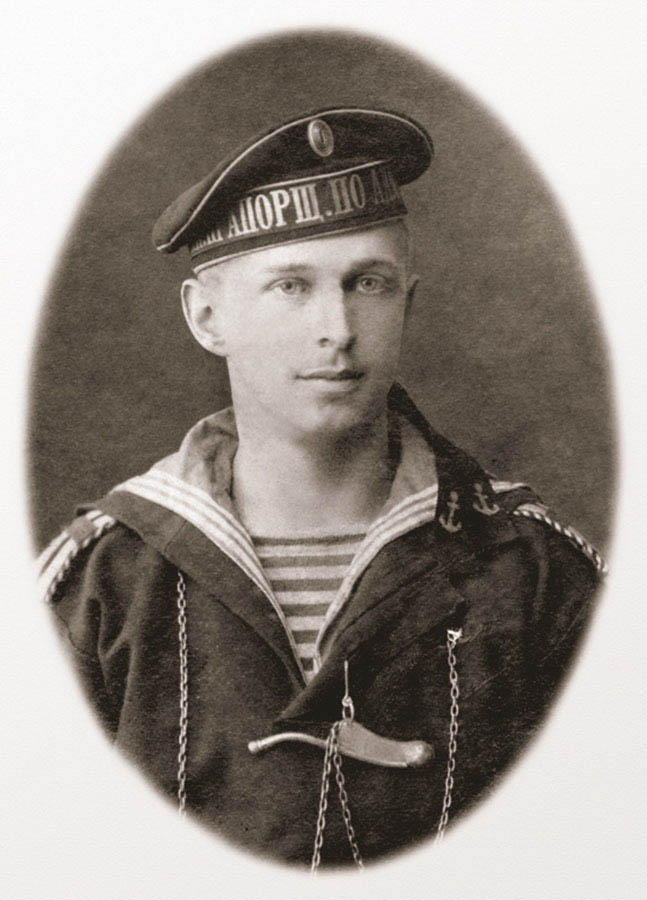 Б. Н. Абрамов – прапорщик по адмиралтейству. 1917 г.